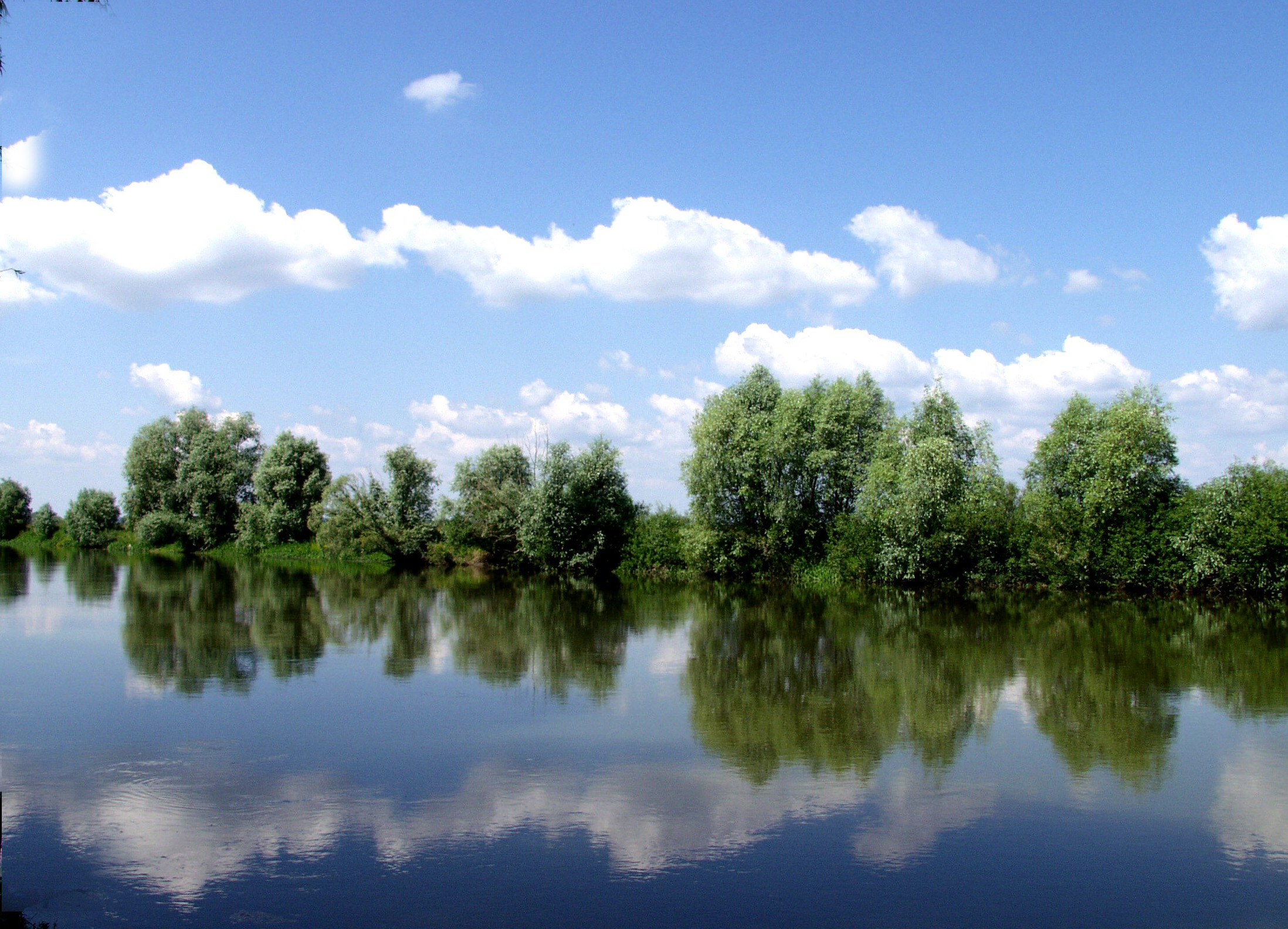 Река Стырь в Кузнецовске летом. Ровенская область. Украина.